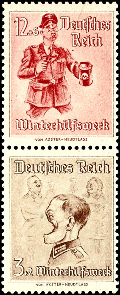 Britische Propagandafälschung für Deutschland: Gefälschte Marken zugunsten des "Winterhilfswerks": Soldat mit eingeschlagenem Gesicht, Göring bzw. Himmler sammelt für die Winterhilfe. Teil eines Markenheftchens in der Größe 5 x 2.